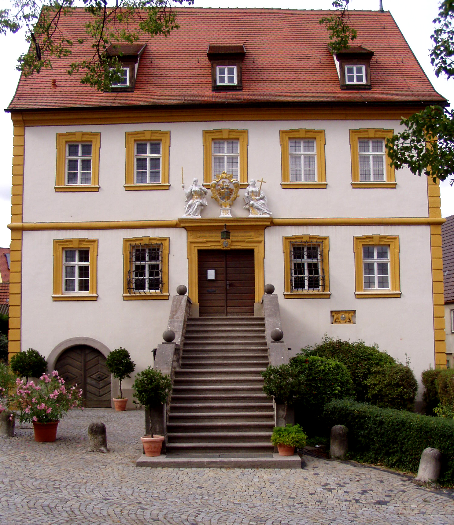 Barockes Rathaus von Winterhausen / Main